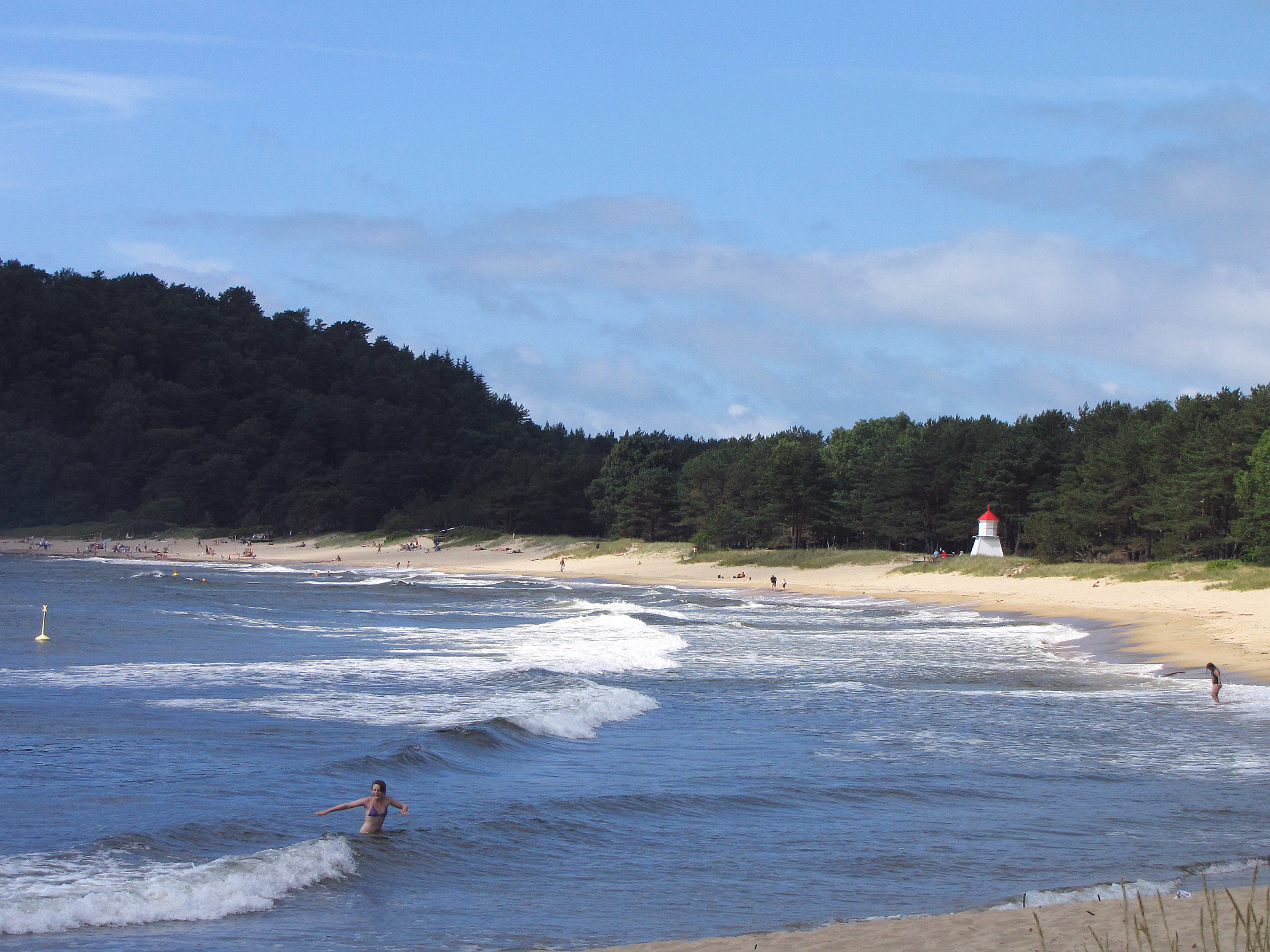 Mandal beach - der Srand von Mandal Vest-Agder Norway Norwegen Foto Wolfgang Pehlemann IMG_9381